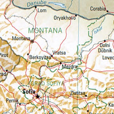 Wraza - Lage des Ortes in Bulgarien